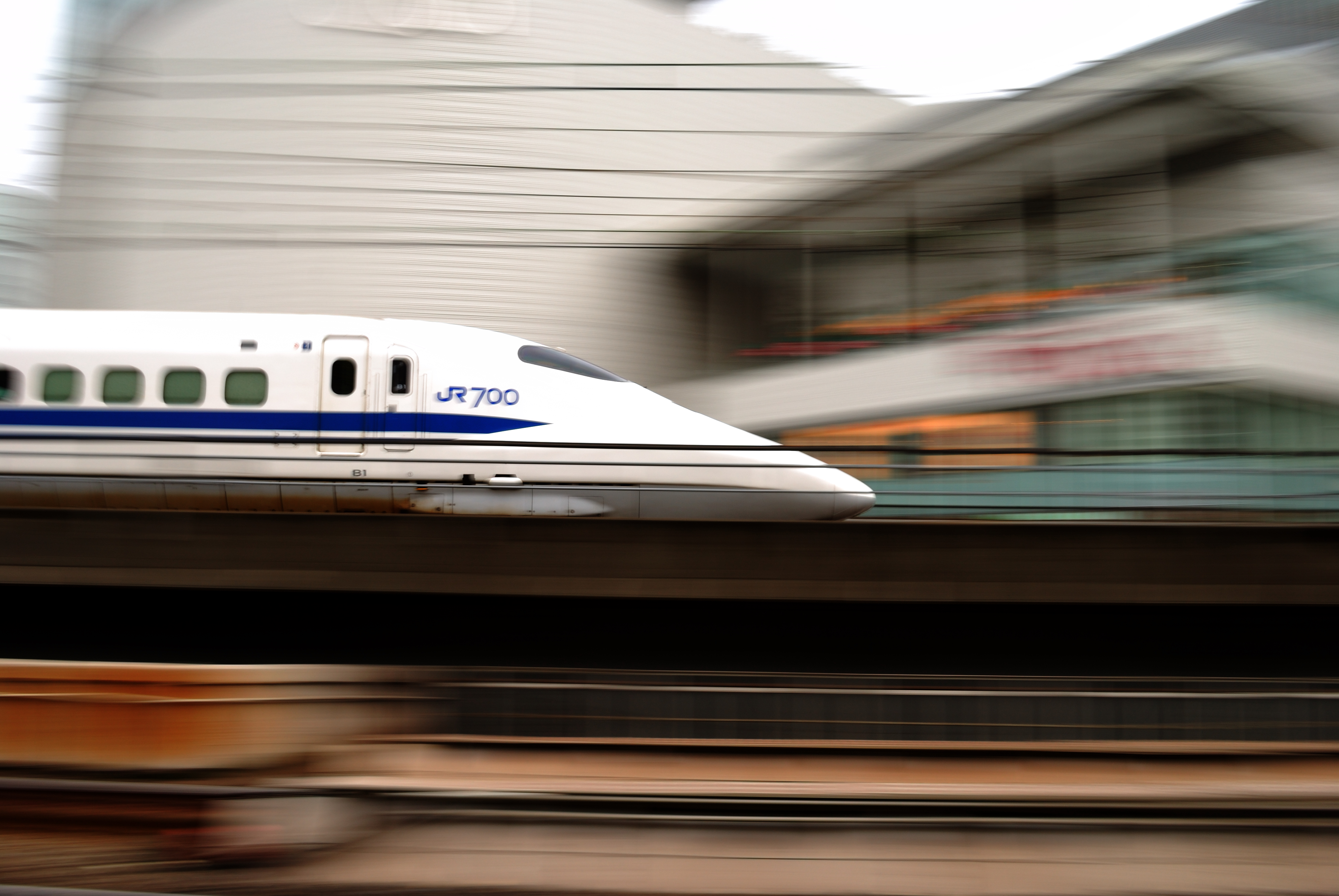 Shenkansen (bullet train) at Yūrakuchō station tokyo japan